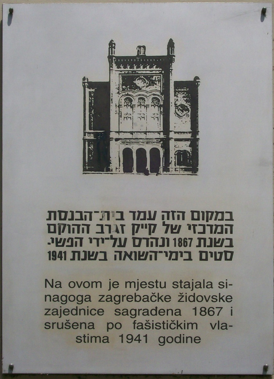 Spomen ploča na srušenu sinagogu u Praškoj ulici u Zagrebu